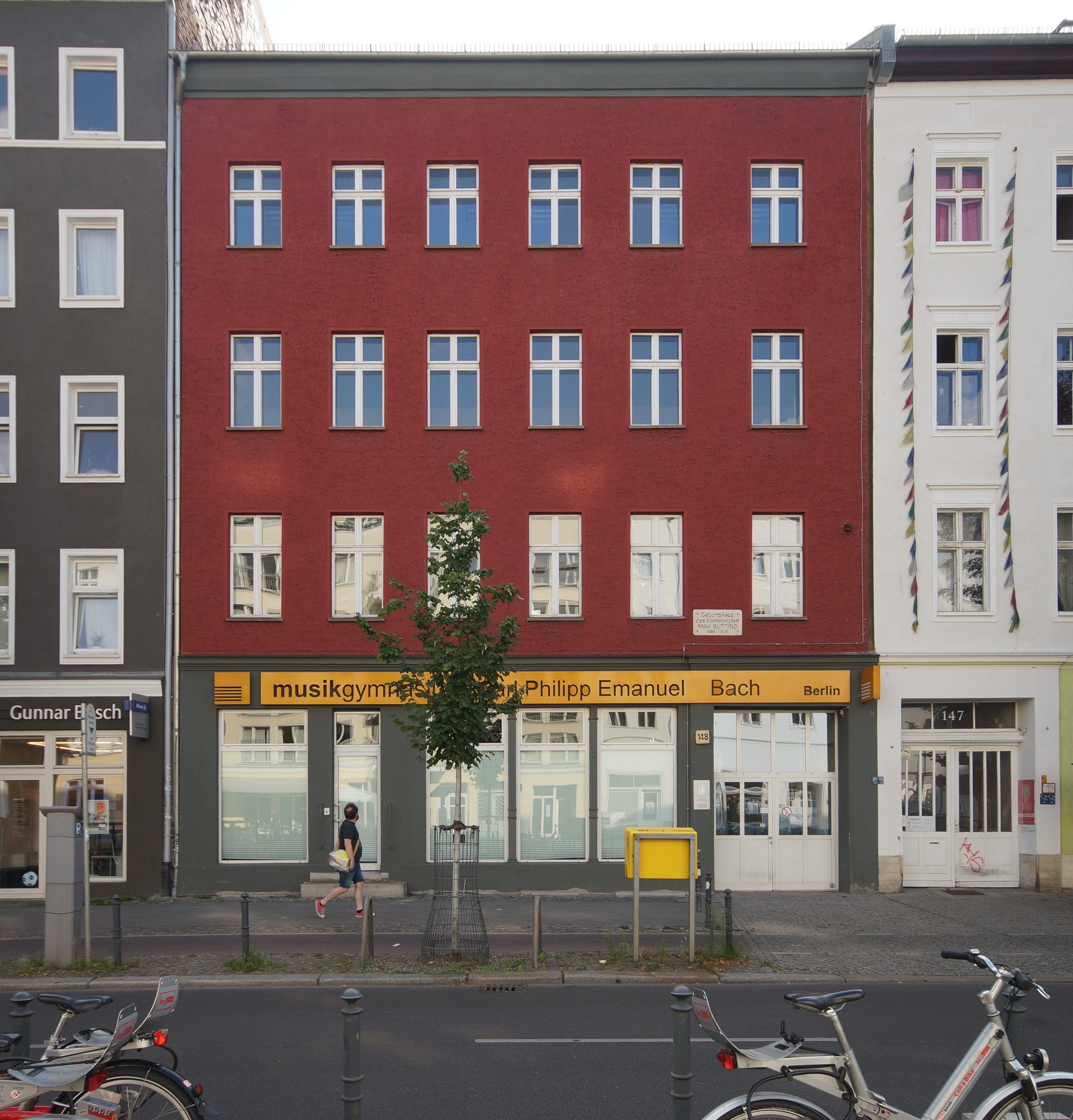 Das Musikgymnasium Carl Philipp Emanuel Bach in Berlin-Mitte von der Brunnenstraße aus